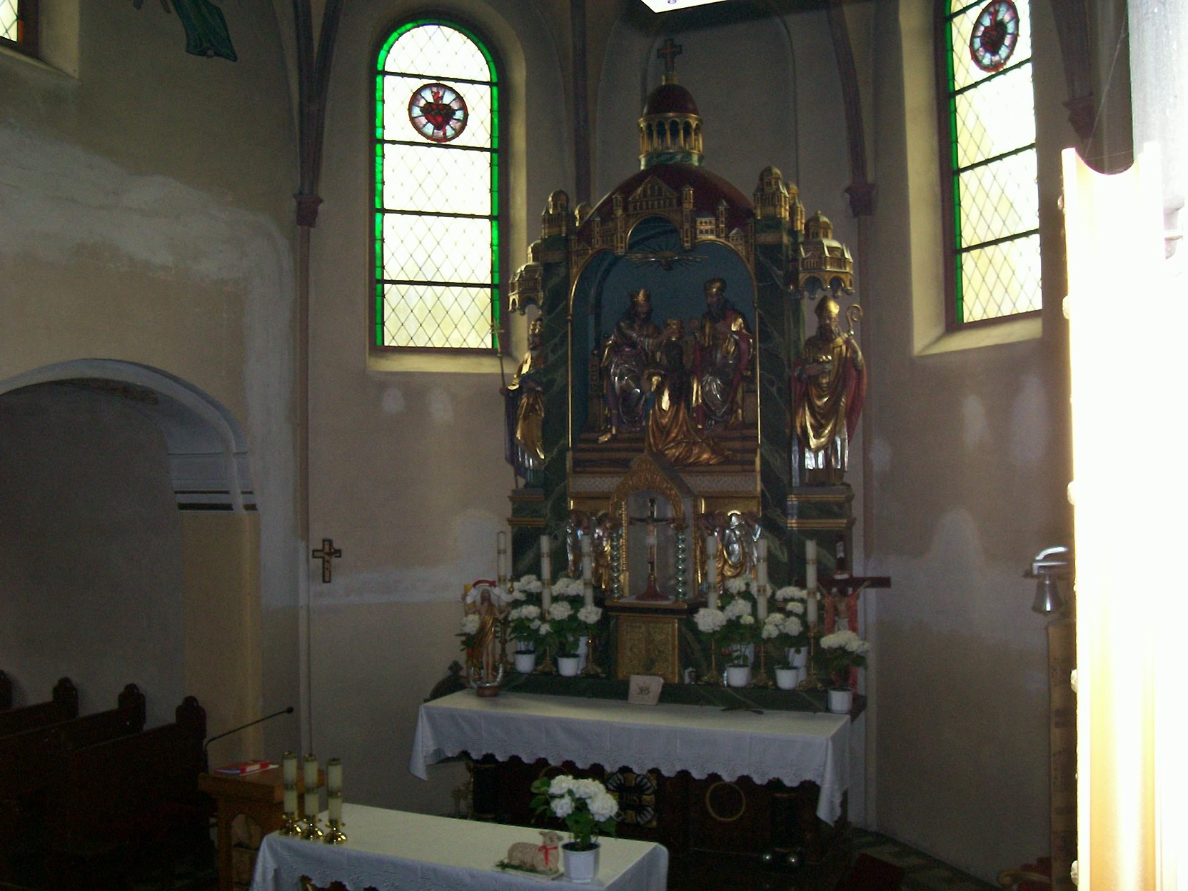 Kościół pw. Najświętszej Marii Panny w Krowiarkach: ołtarz główny